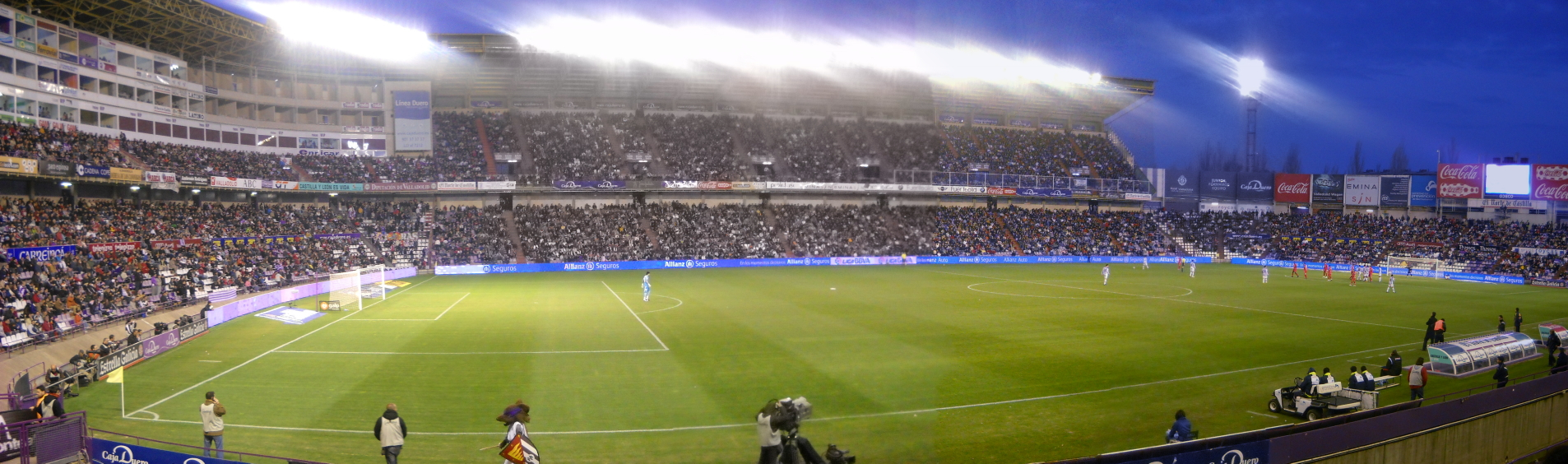 Estadio Nuevo José Zorrilla de Valladolid